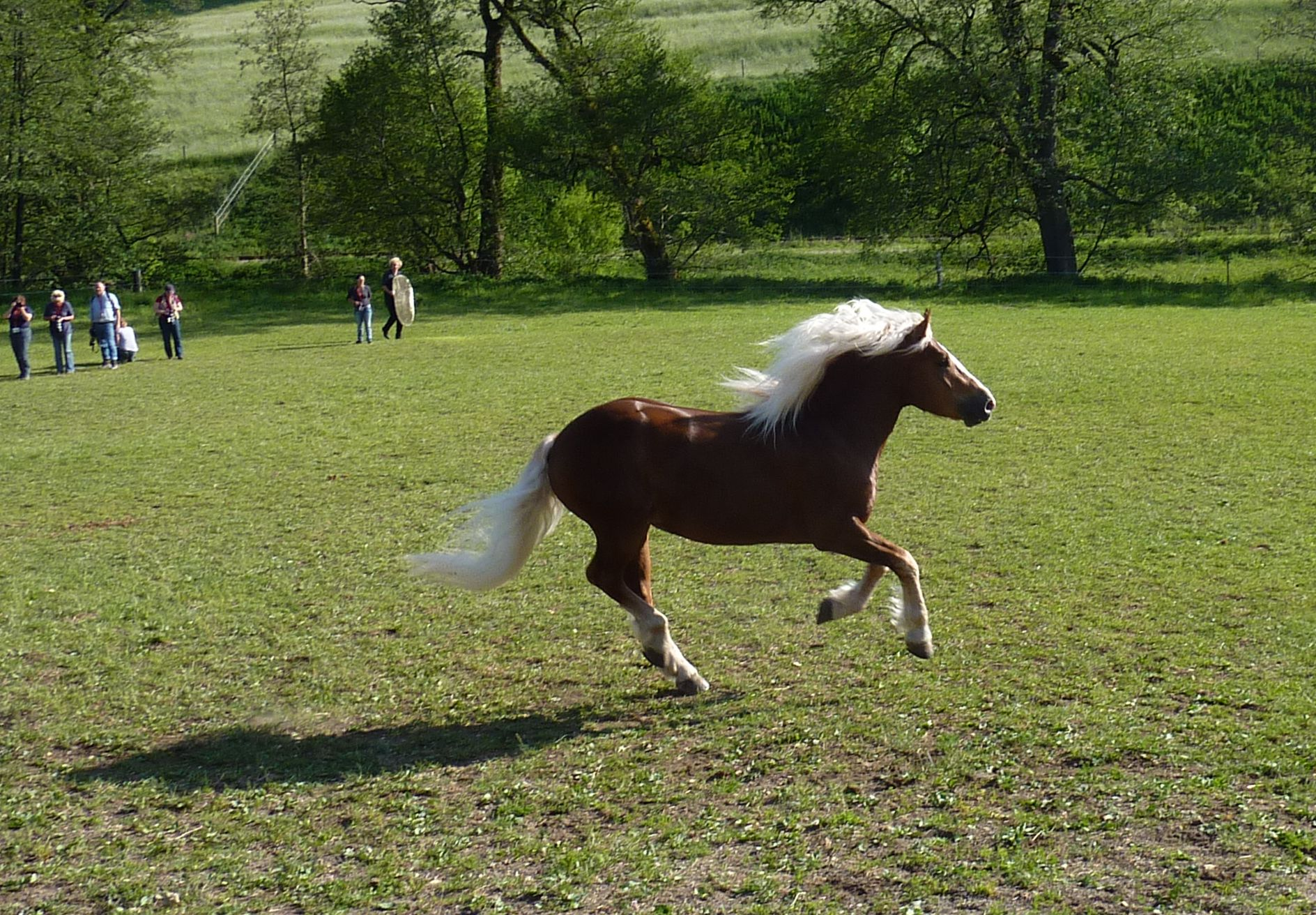 Schwarzwälder Kaltblut, im Hintergrund Mitglieder eines Fotokurses, für die das Pferd in Bewegung gesetzt wurde